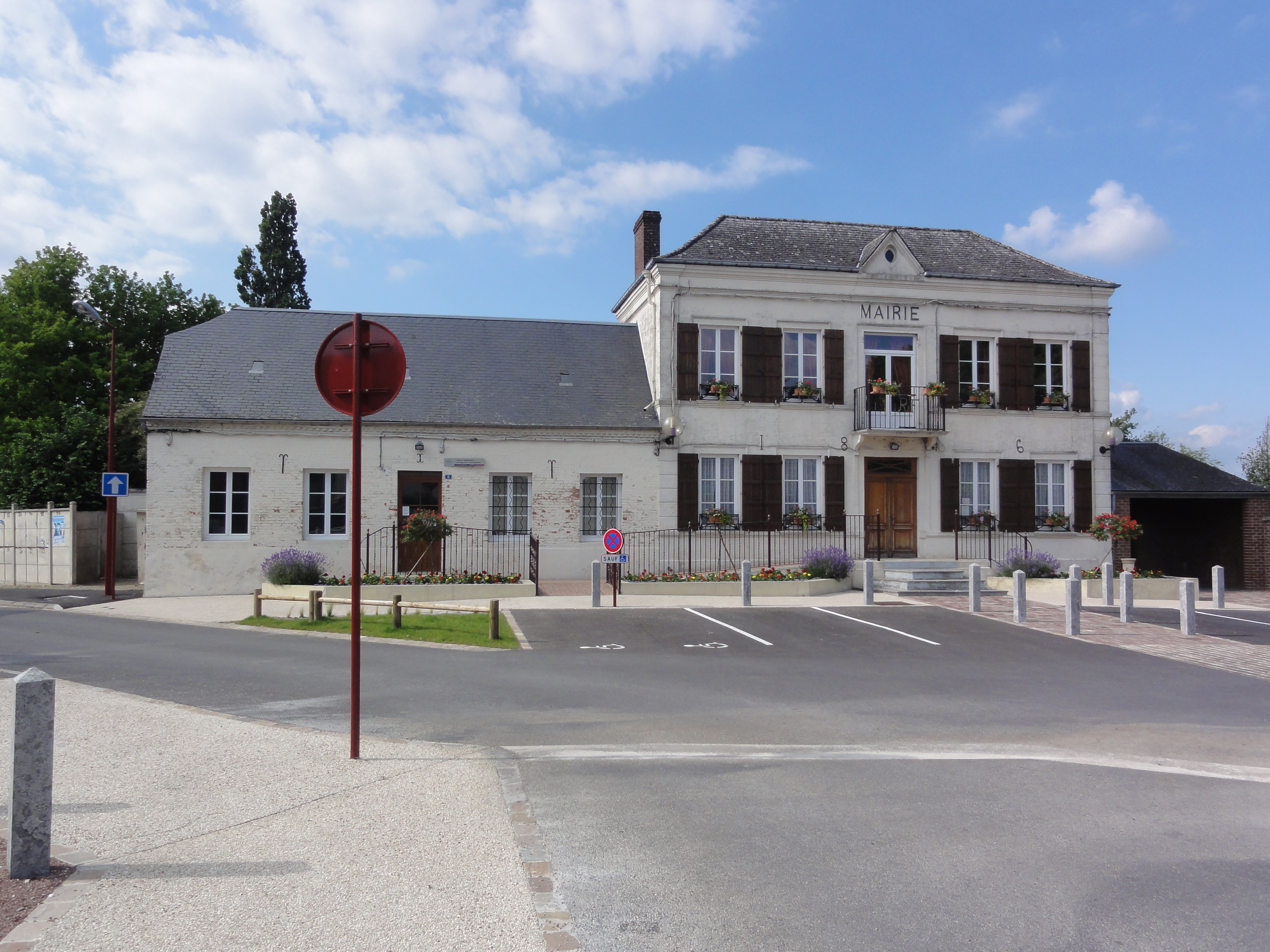 Landouzy-la-Ville (Aisne) mairie